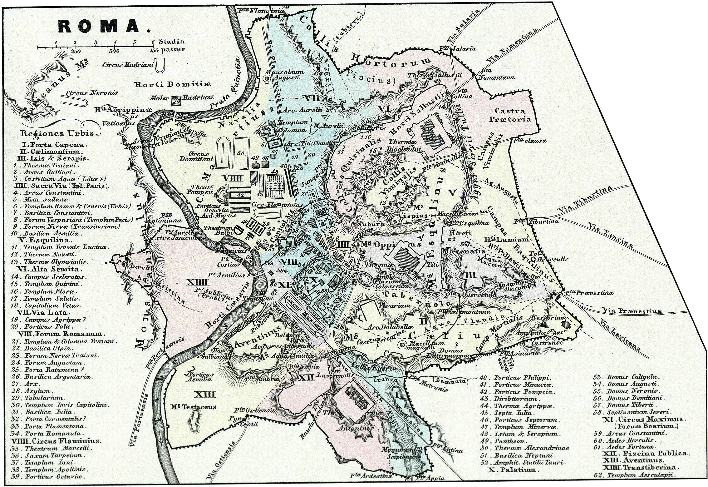 Карта Рима по 3-му изданию атласа Карла Шпрунера, осуществленному Теодором Менке в 1862 г.